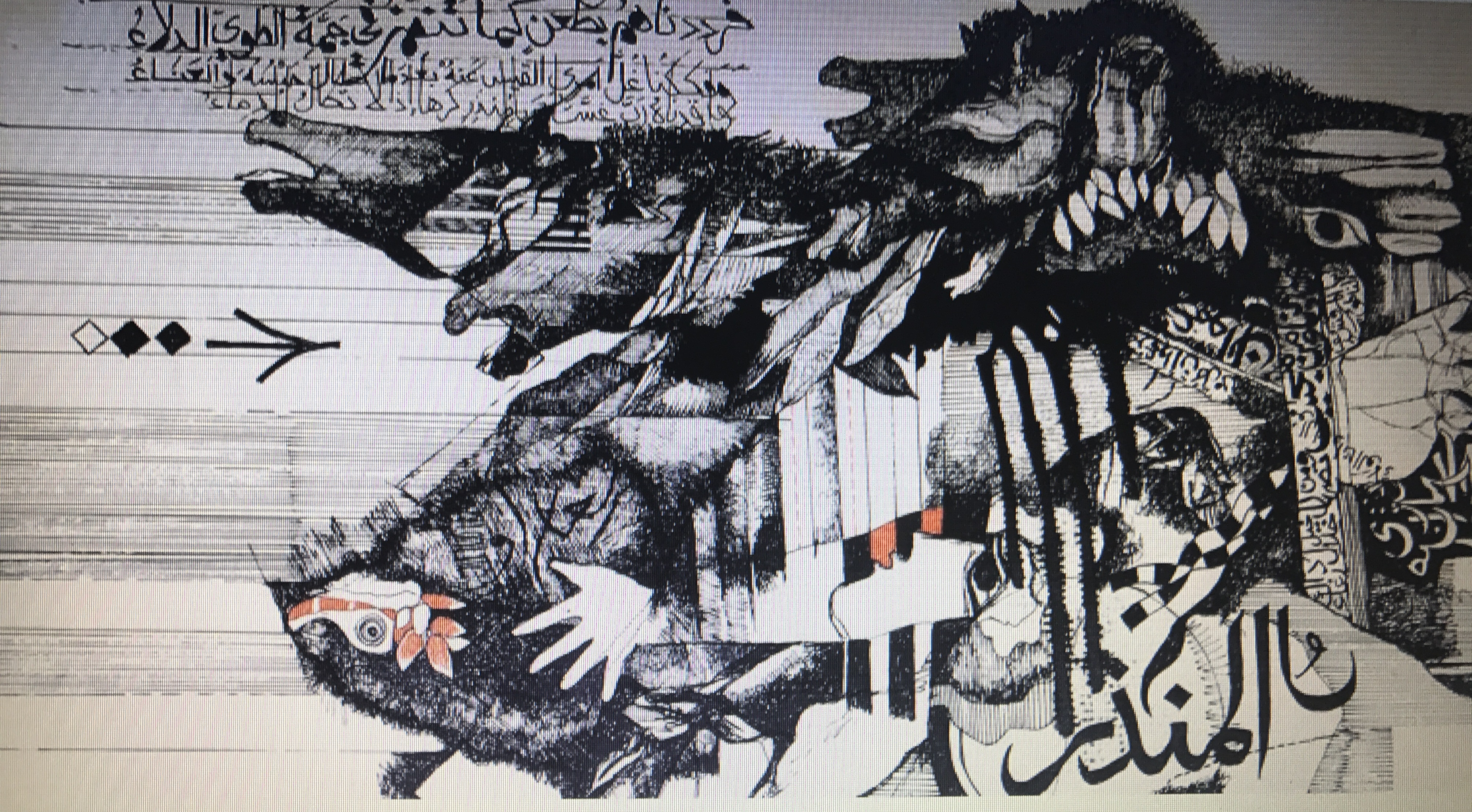 The Golden Odes-1978